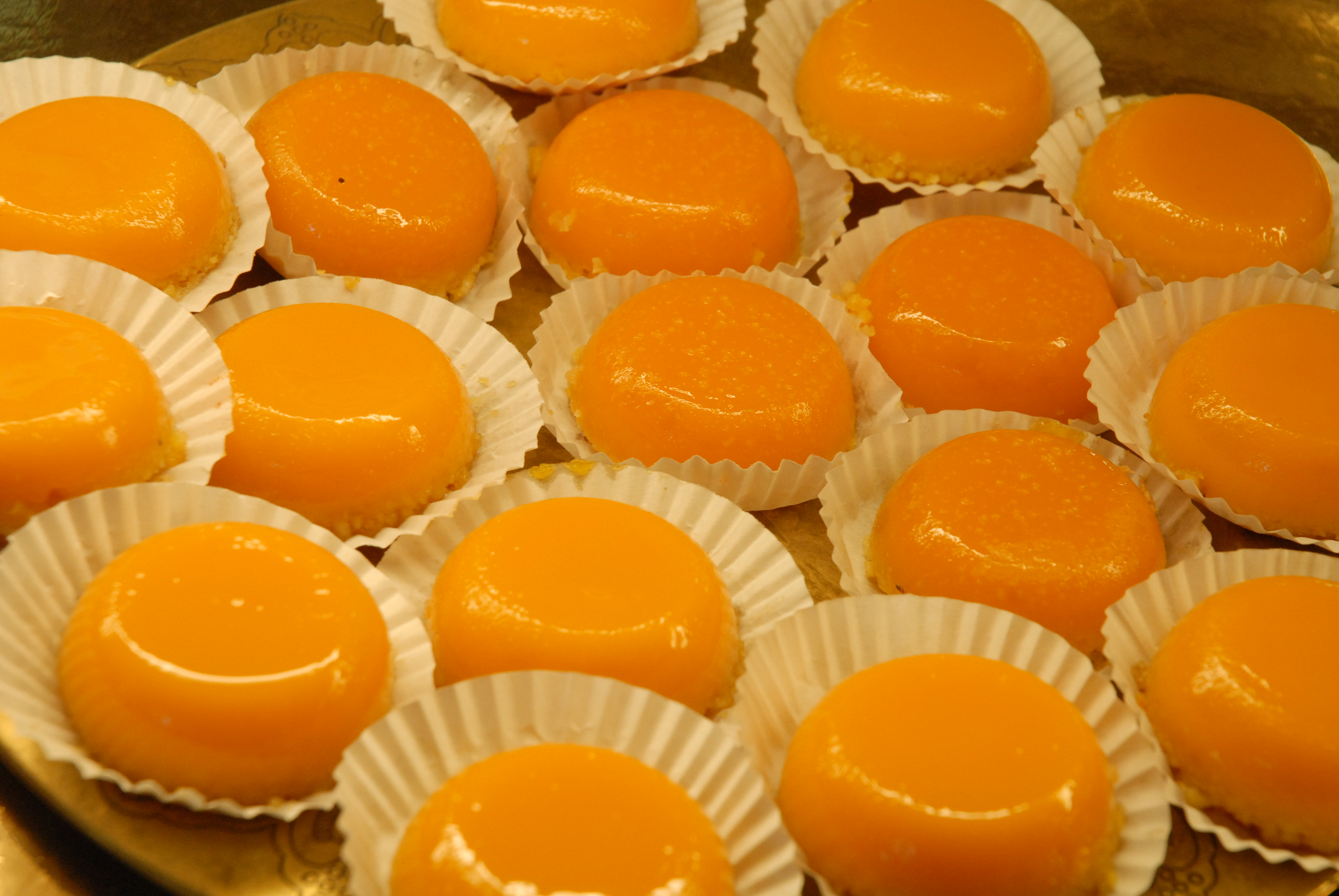 As Brisas do Lis é uma pastelaria tipica de Leiria; confecionada a partir de gemas de ovo, açucar e amêndoa e tem no final este aspeto de gema de ovo com uma fina base de camada de amêndoa sendo o resto da doçaria mole e firme ao mesmo tempo e muito doce na sua totatlidade.